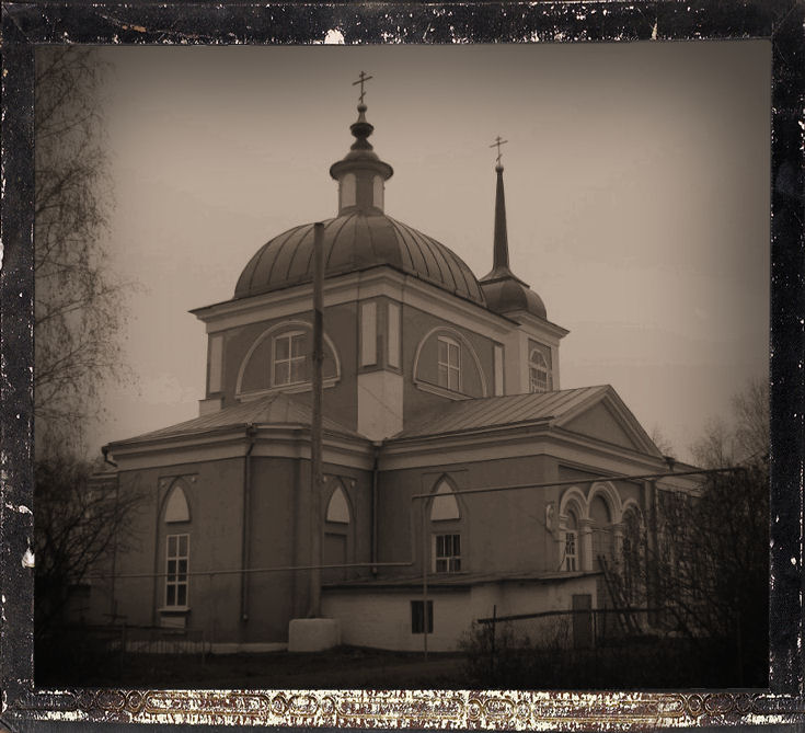 Фото сделано собственноручно и обработано под старину.